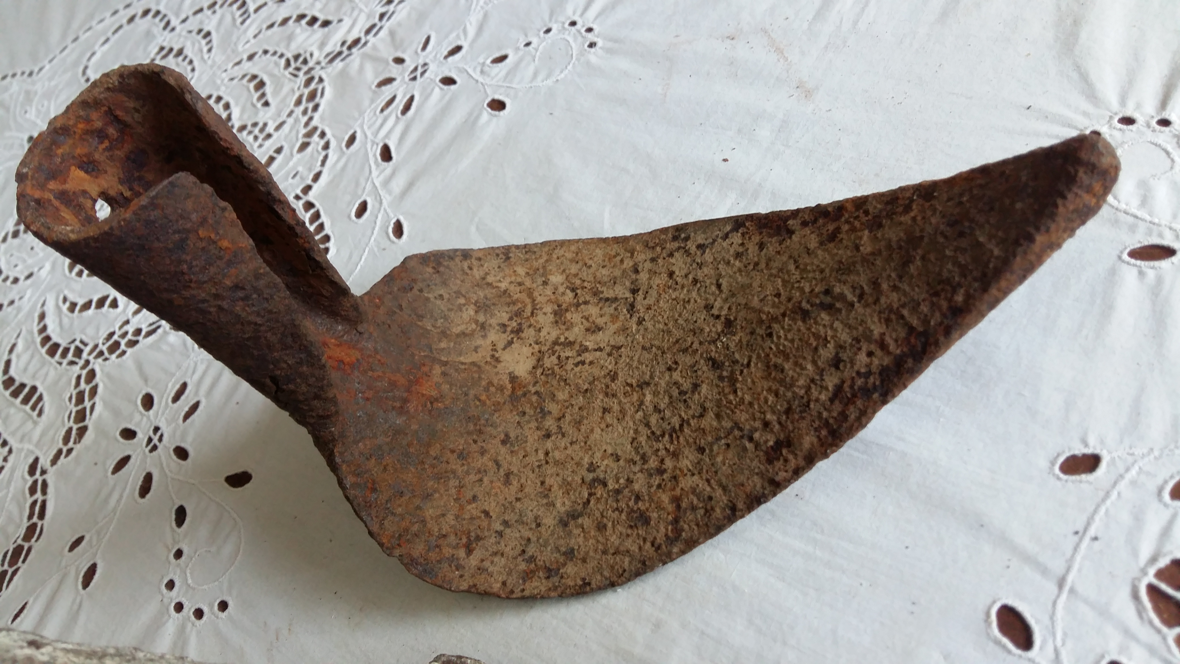 Este almocafre es raro ya que fue construido en el siglo XVIII y pertenece a la colección del Instituto Histórico y Geográfico de Minas Gerais (acceso libre)